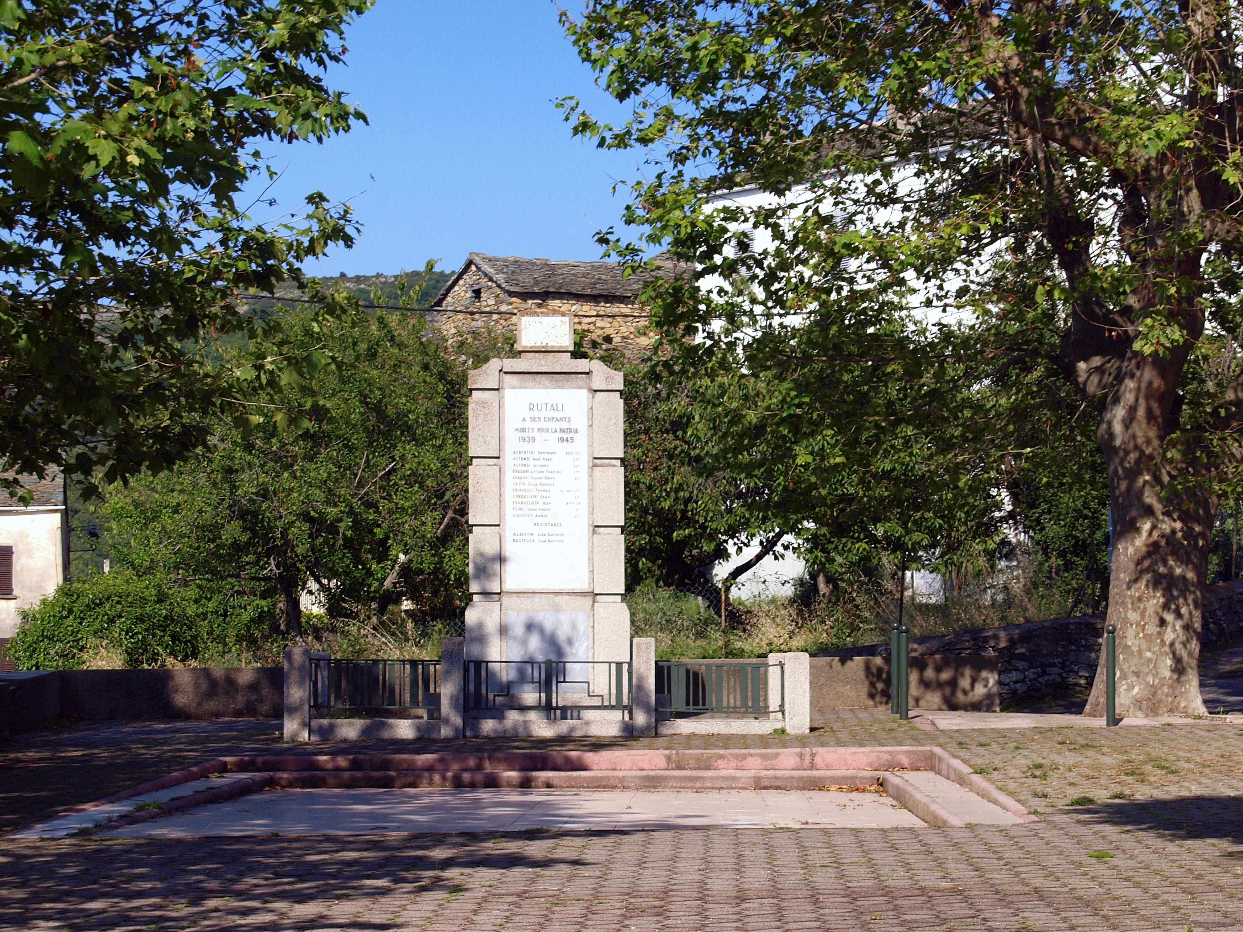 Rutali, Nebbio (Corse) - Monument aux morts, place de l'église